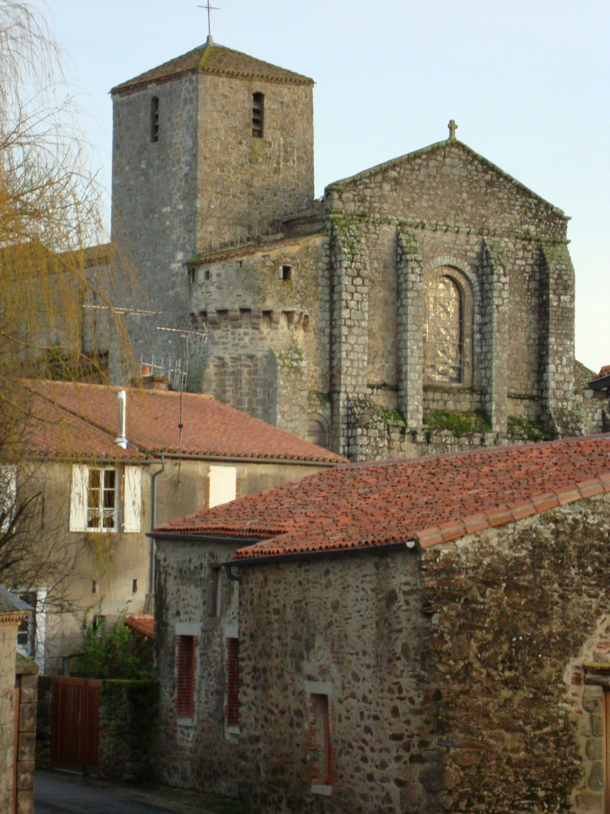 Église Saint-Nicolas de La Chaize-le-Vicomte, (Classé, 1908) .